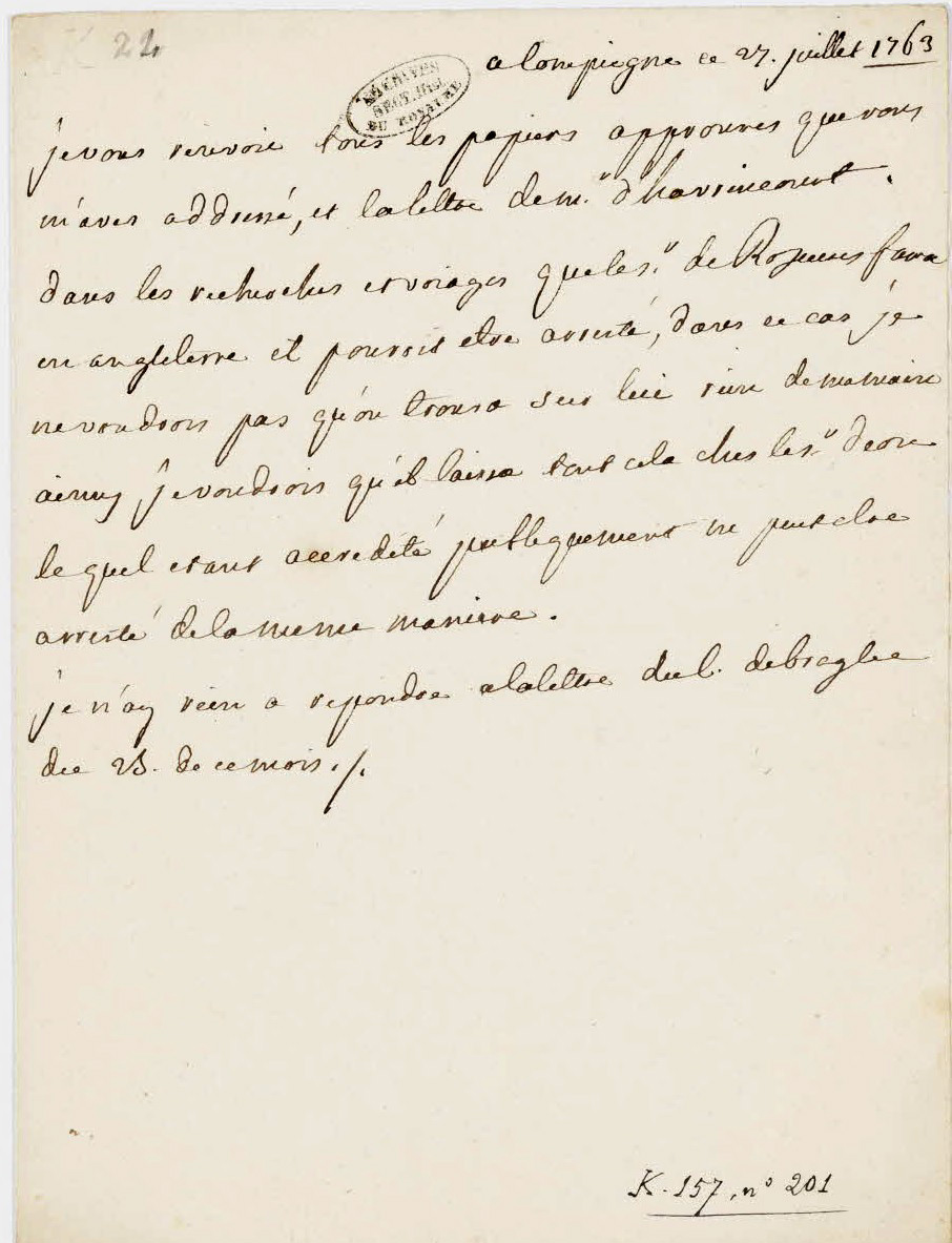 Lettre de Louis XV au comte Charles-François de Broglie lui demandant d'ordonner au sieur de la Rosière, agent secret en Angleterre, de mettre ses papiers compromettants à l'abri chez le chevalier d'Eon